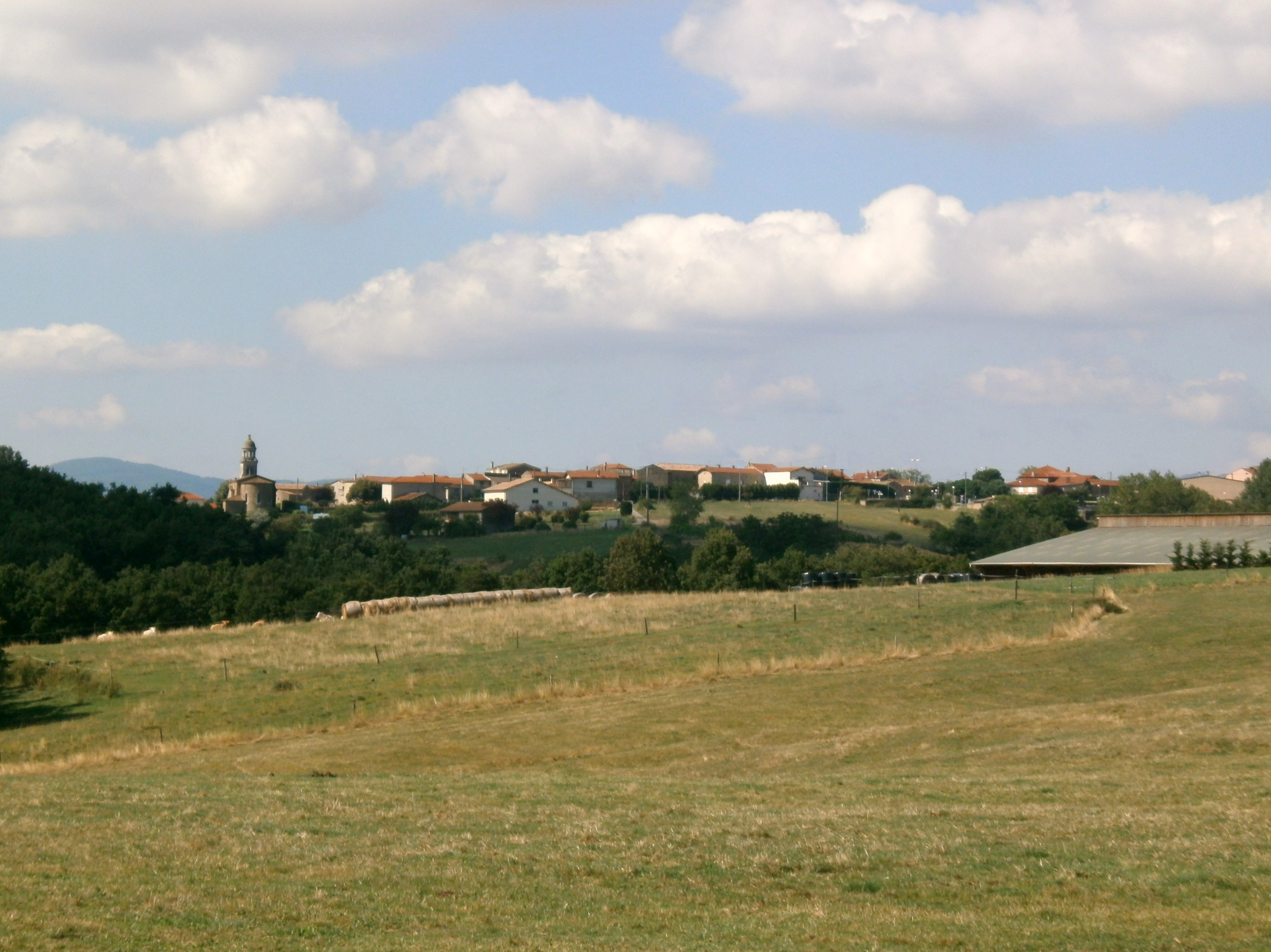 Talencieux, vue générale.